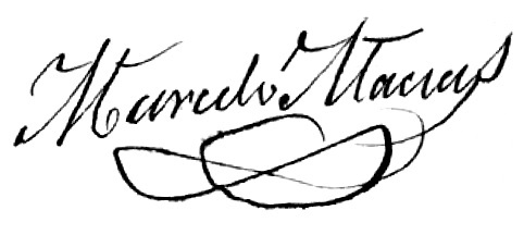 Sinatura de Marcelo Macías.